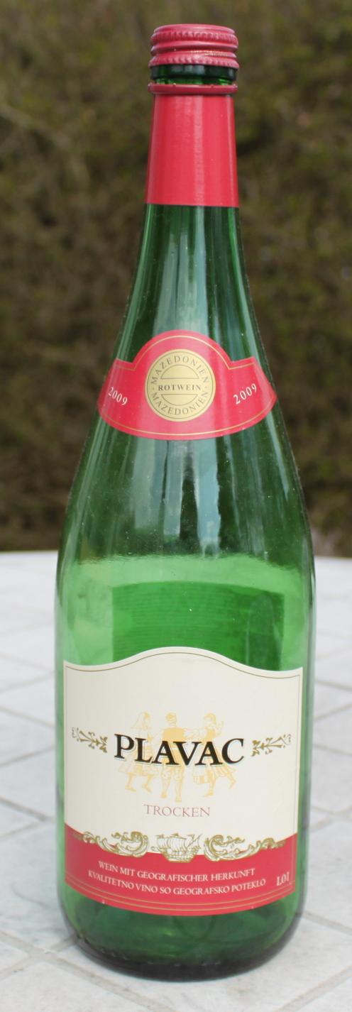 Flasche "Plavac", 1 Liter, trockener Rotwein Abgefüllt von D-RP342352 Vertrieb über "Binger St. Rochusberg Weinhandels GmbH", Bingen Einsprachige Beschriftung für Inlandsverbrauch in Deutschlnad